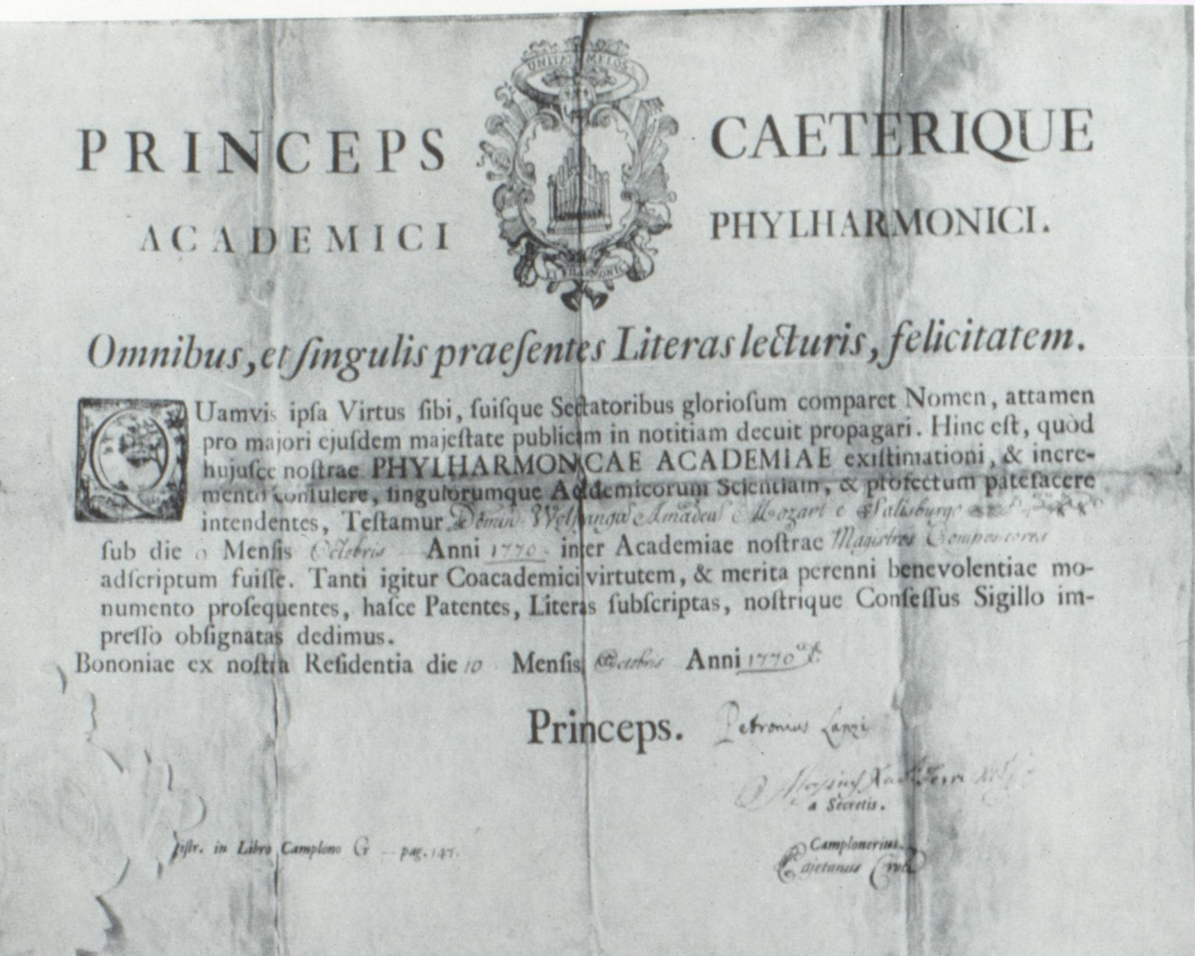 Accademia Filarmonica Bologna Mozart 1770